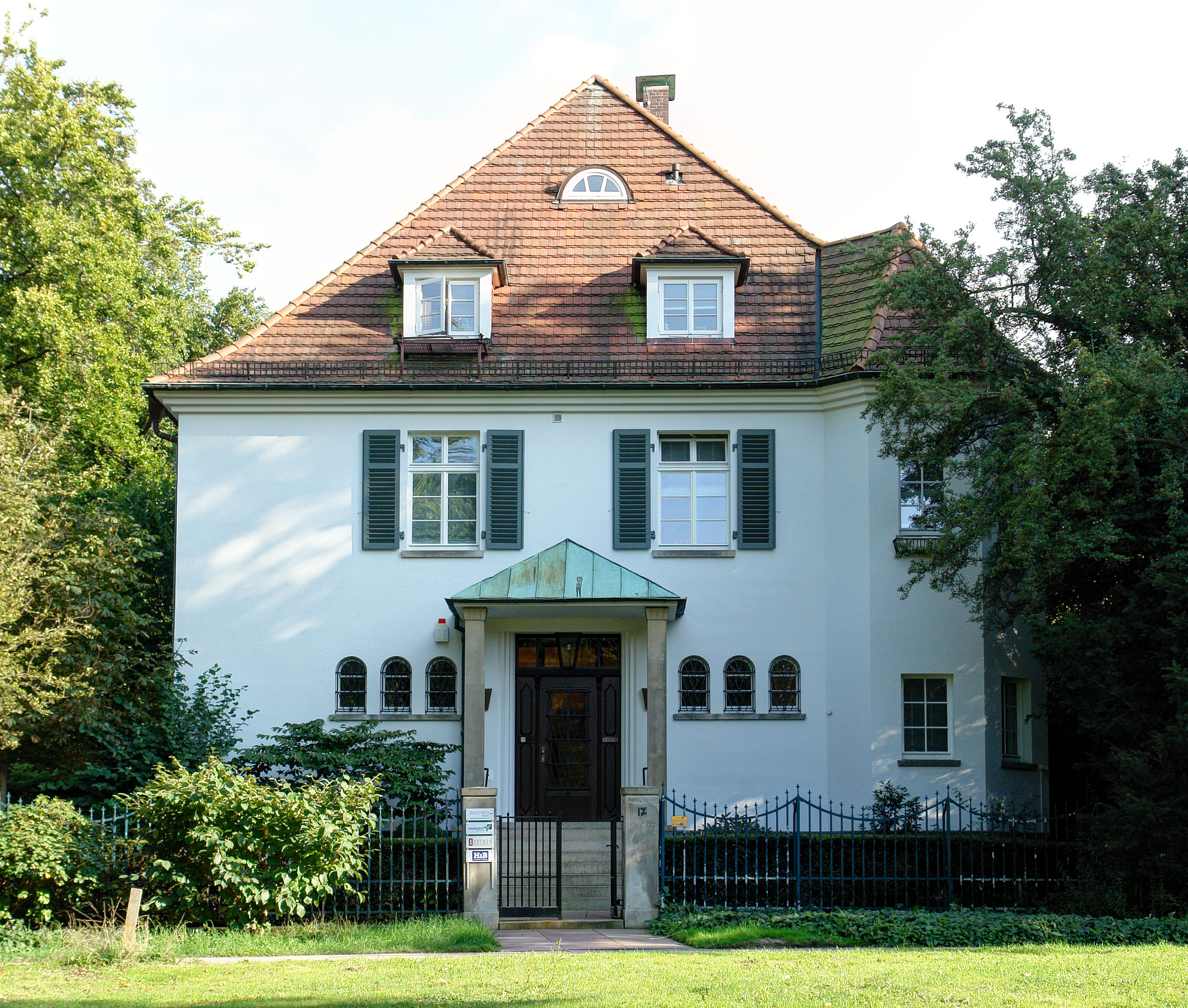 Villa Knüppel in Bremen, Blumenthalstraße 17Das abgebildete Objekt ist ein geschütztes Kulturdenkmal in der Freien Hansestadt Bremen, mit der Nr. 0208 beim Landesamt für Denkmalpflege registriert.